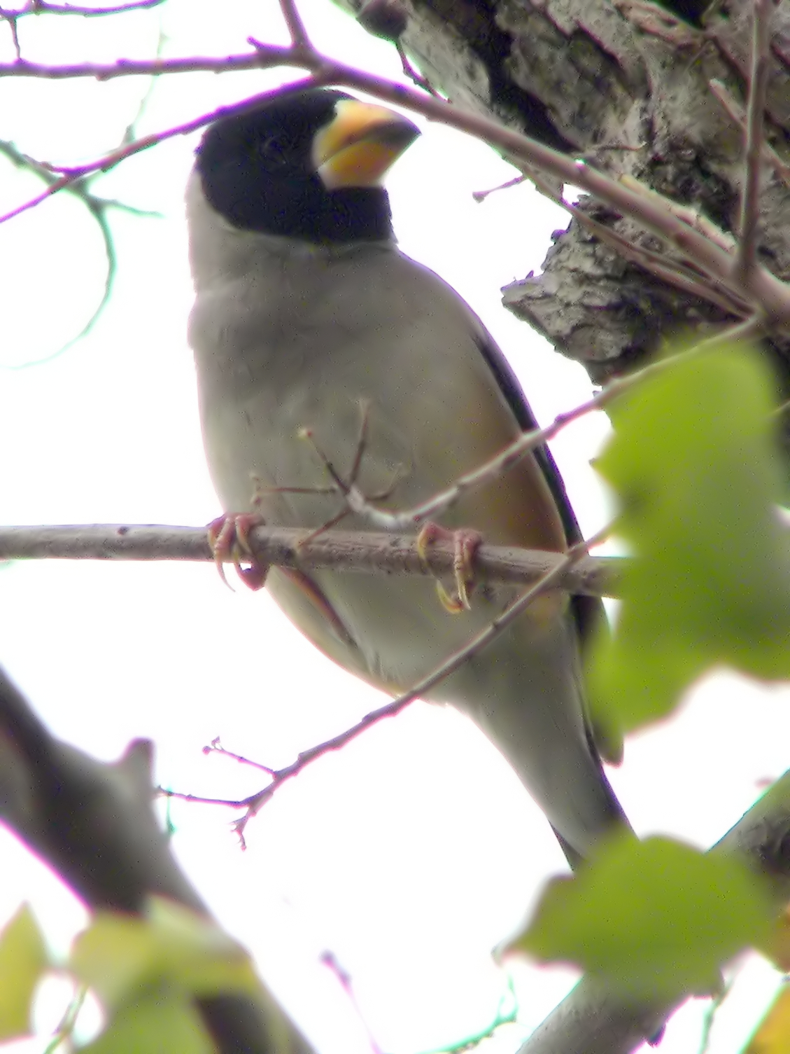 Eophona migratoria in Hong Kong, China.